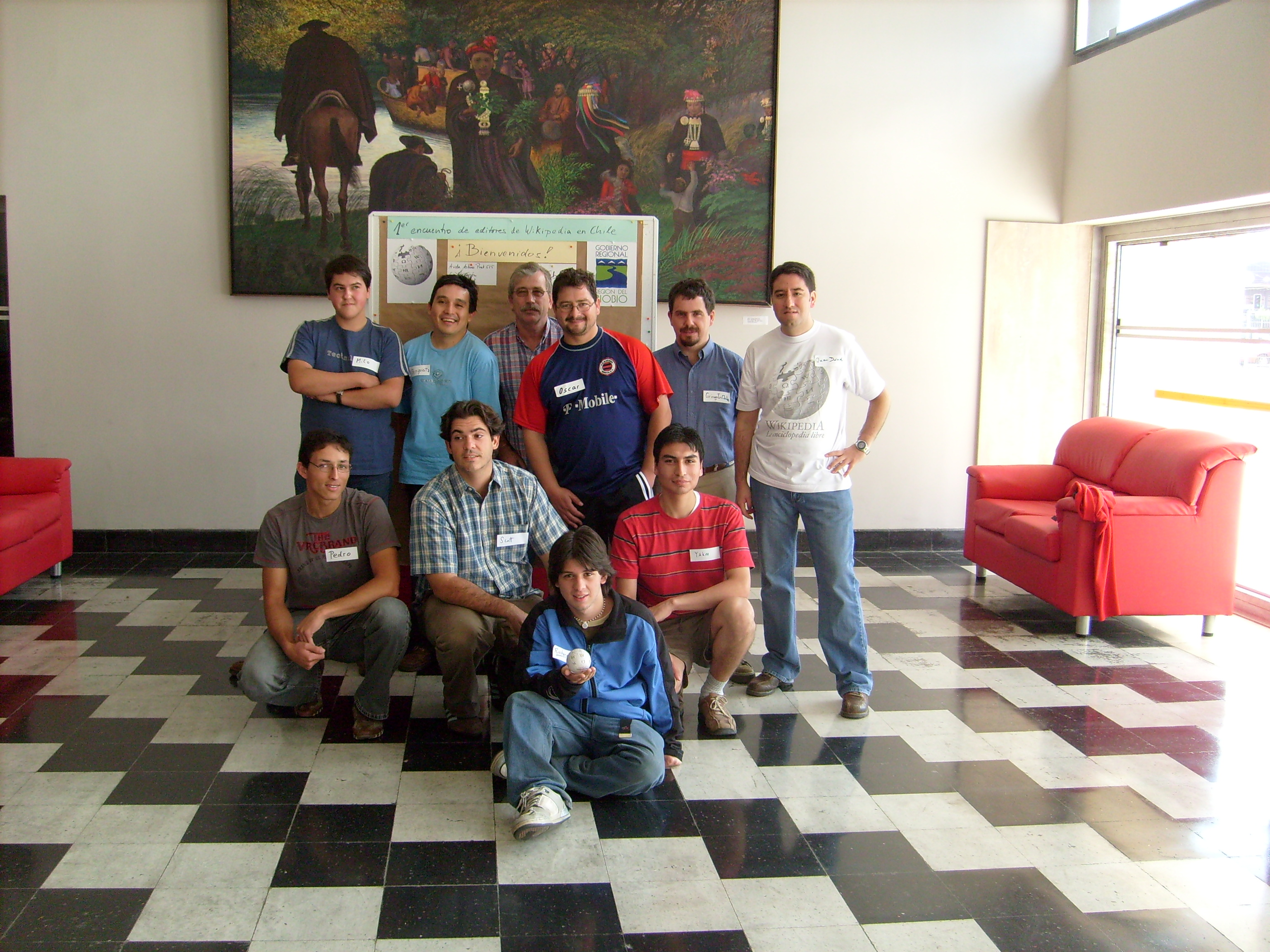 Foto grupal del Encuentro de Wikpedistas en Concepción (Chile)